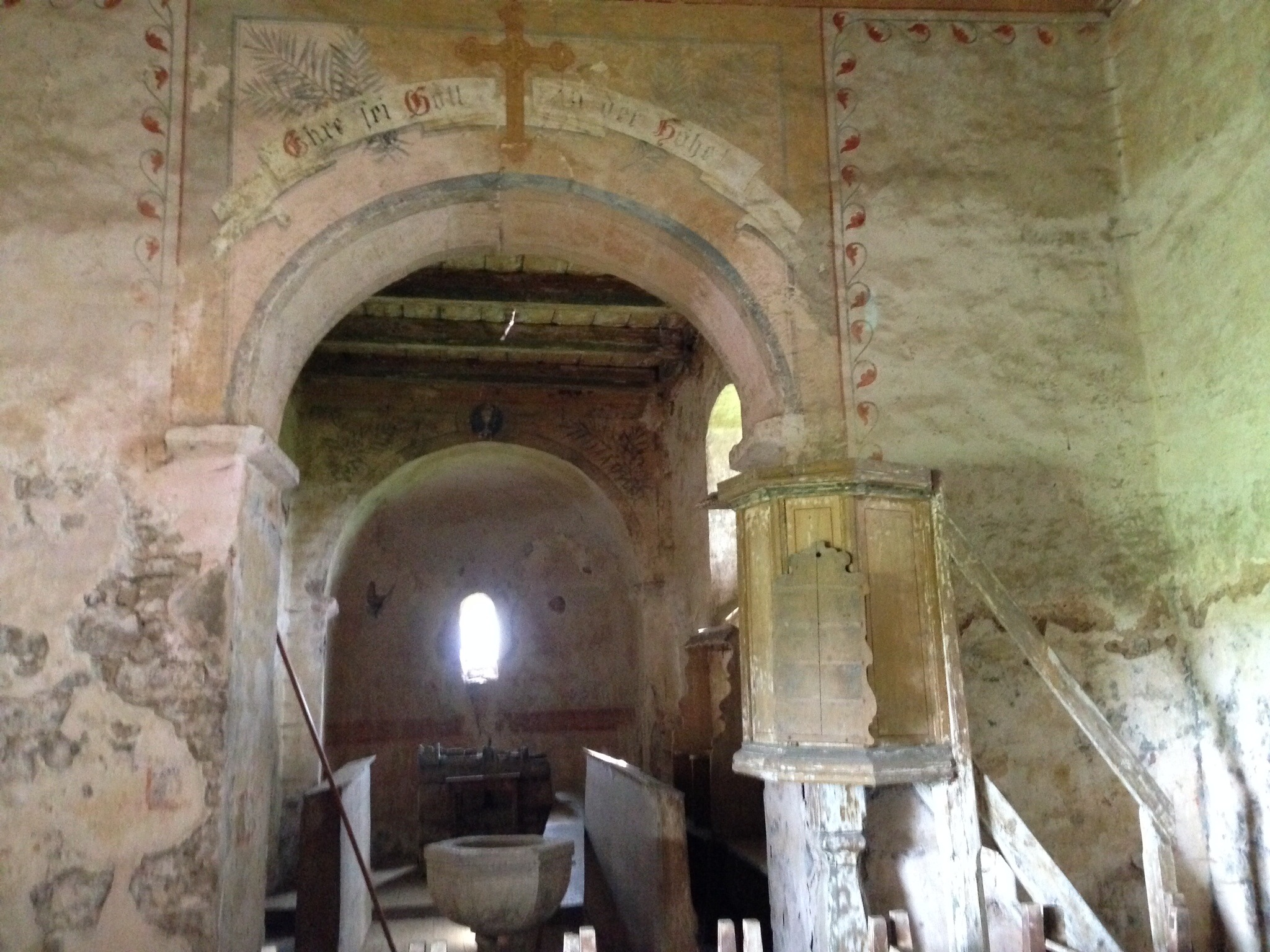 Blick in den Innenraum der St.-Anna-Kapelle in Krobitz